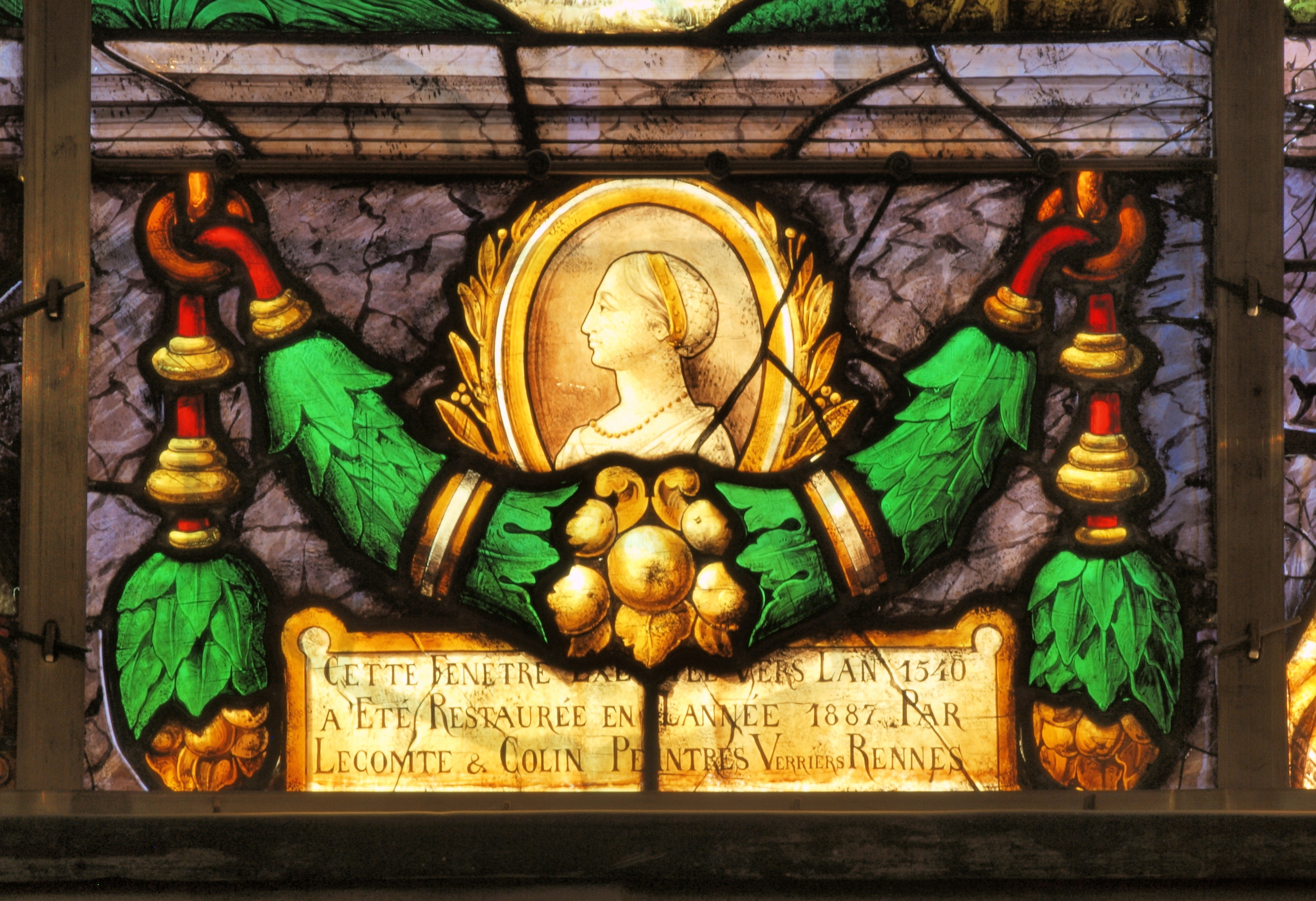 Vitrail de l'église Saint-Patern de Louvigné-de-Bais (Ille-et-Vilaine, France) : marque de Lecomte & Colin, peintres verriers à Rennes